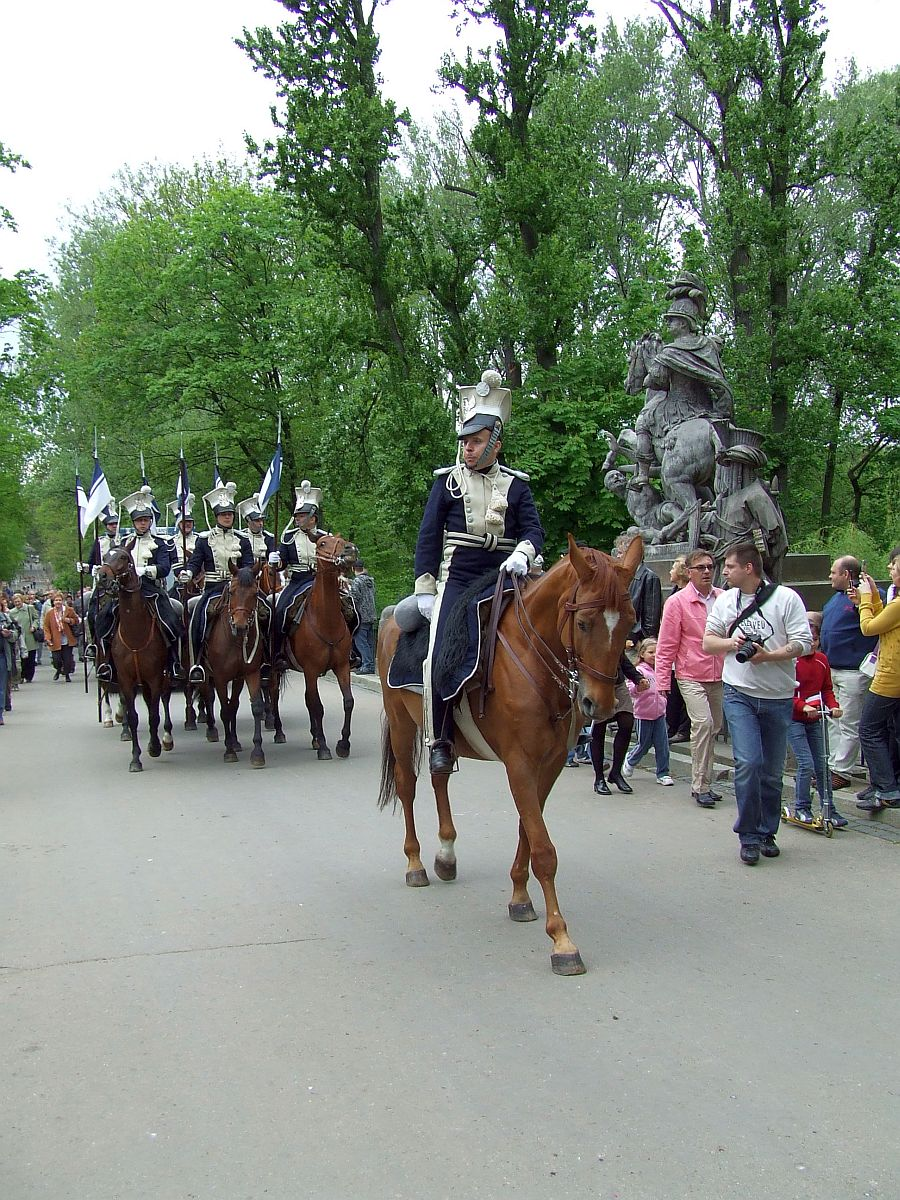 pl:2 Pułk Ułanów Królestwa Kongresowego, rekonstrukcja